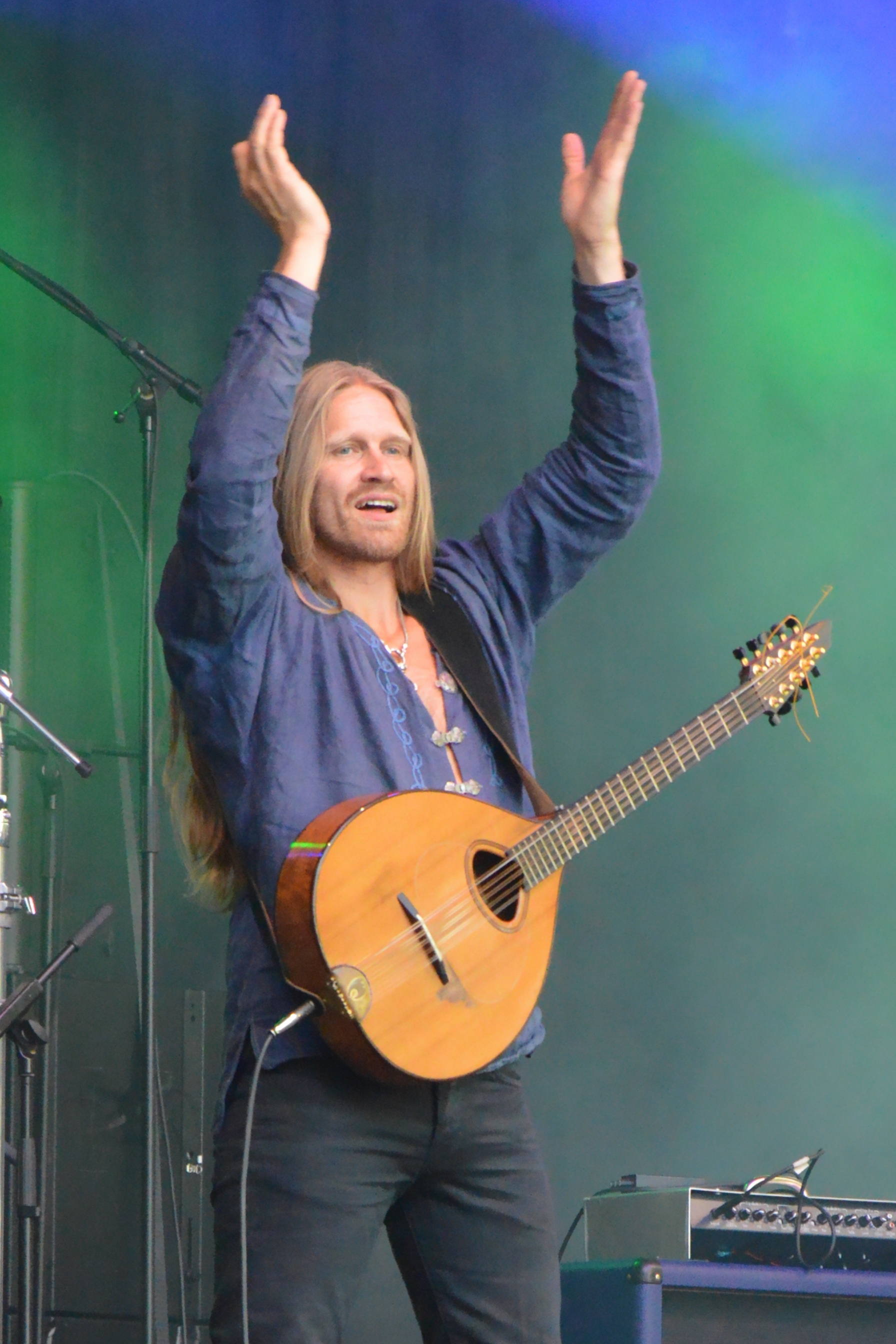 Fejd beim Burgfolk Festival 2013 auf Schloß Broich